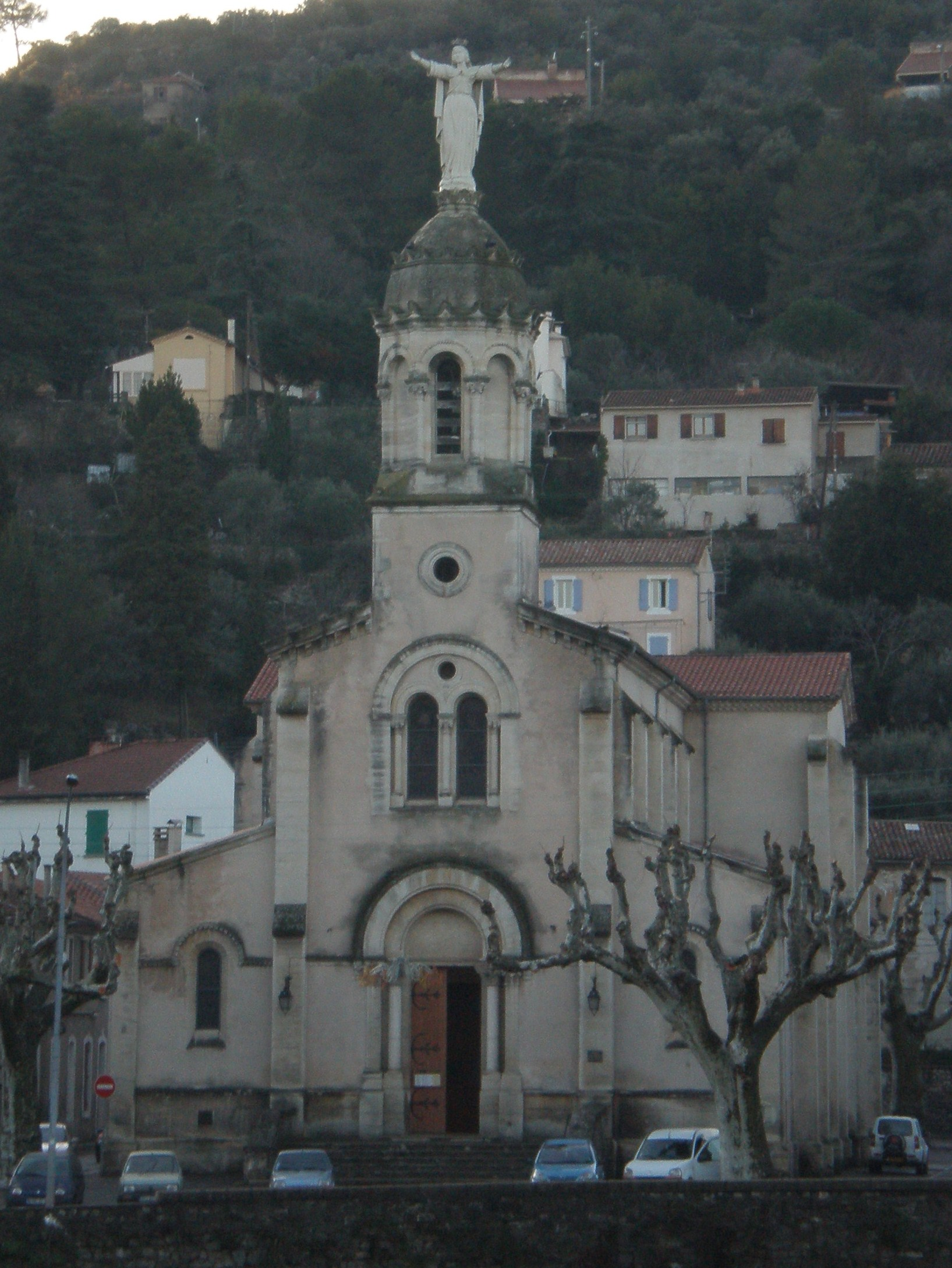 Eglise Notre-Dame de Rochebelle (Gard)